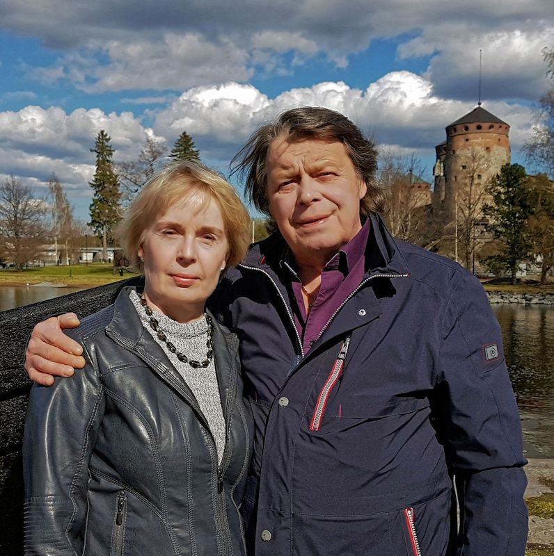 Kirjailijat Anne ja Matti Frost